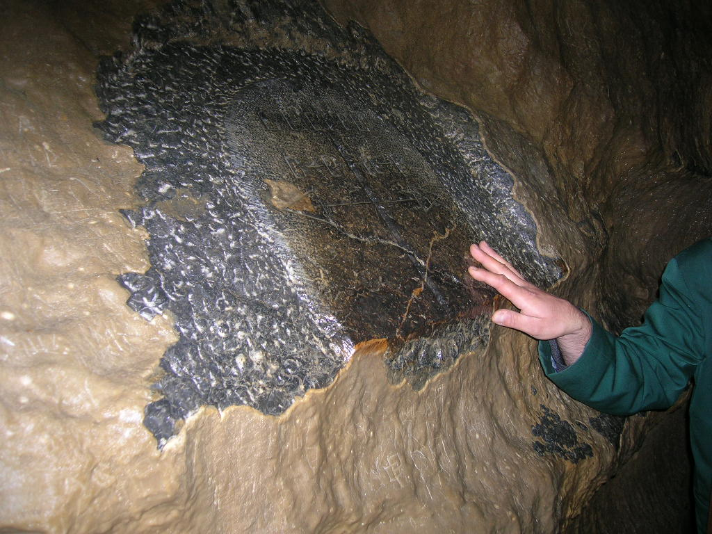 Il confine tra la regione dell'Aquitaine e dei Midi-Pyrénées all'interno delle grotte di Bétharram